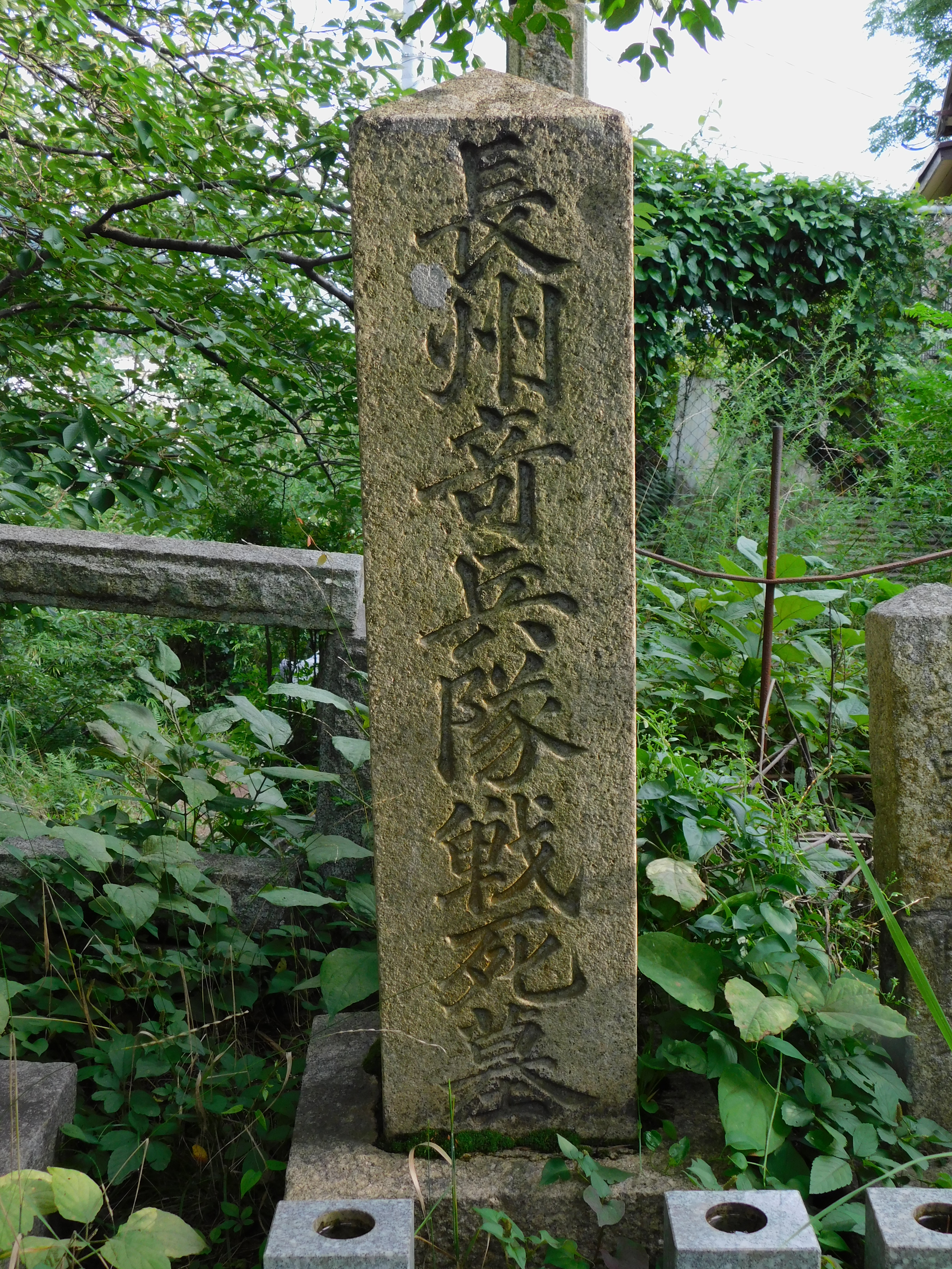 2019年7月23日撮影